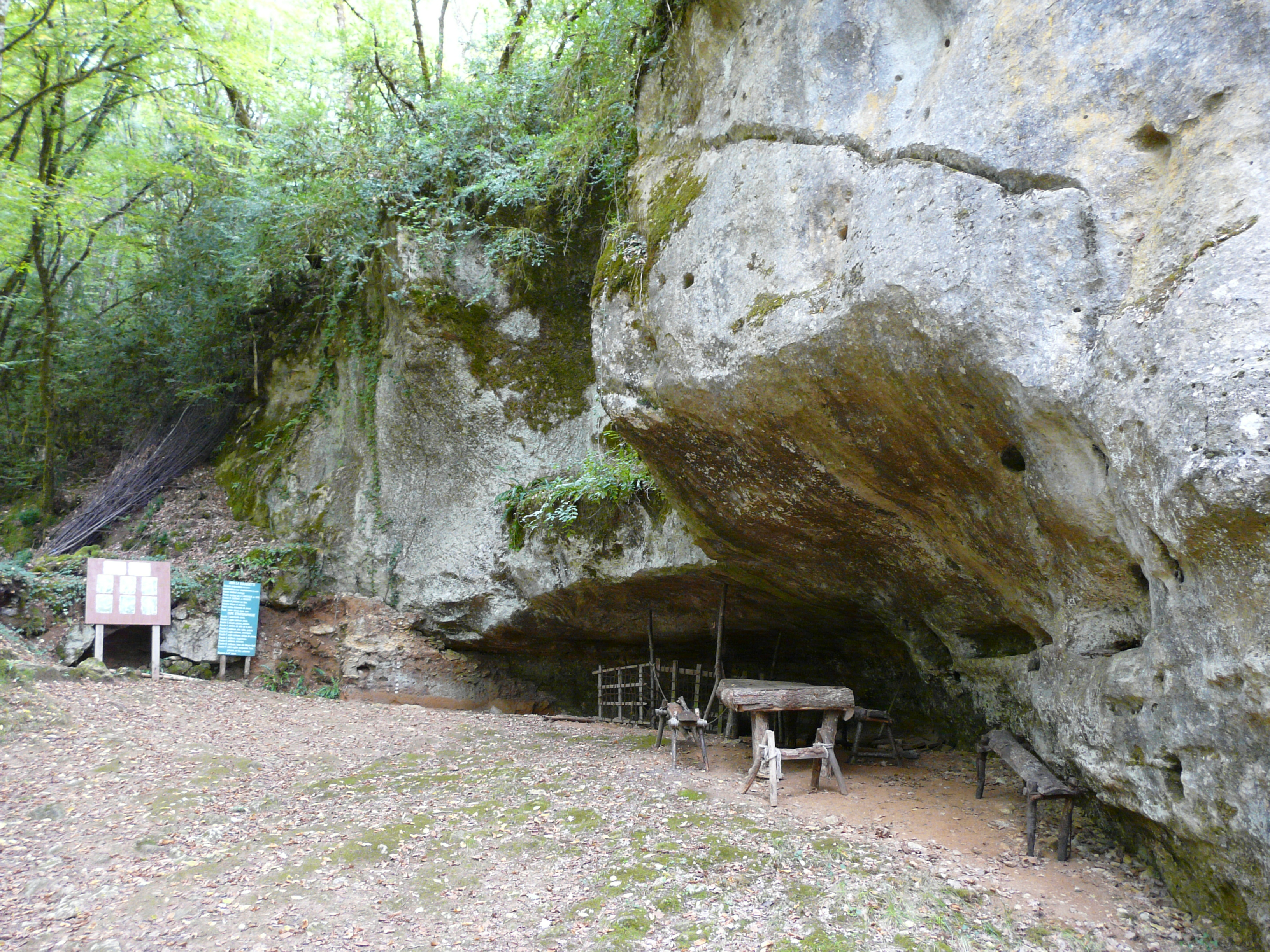 L'abri de la Souquette, Castel Merle, Sergeac, Dordogne, France.